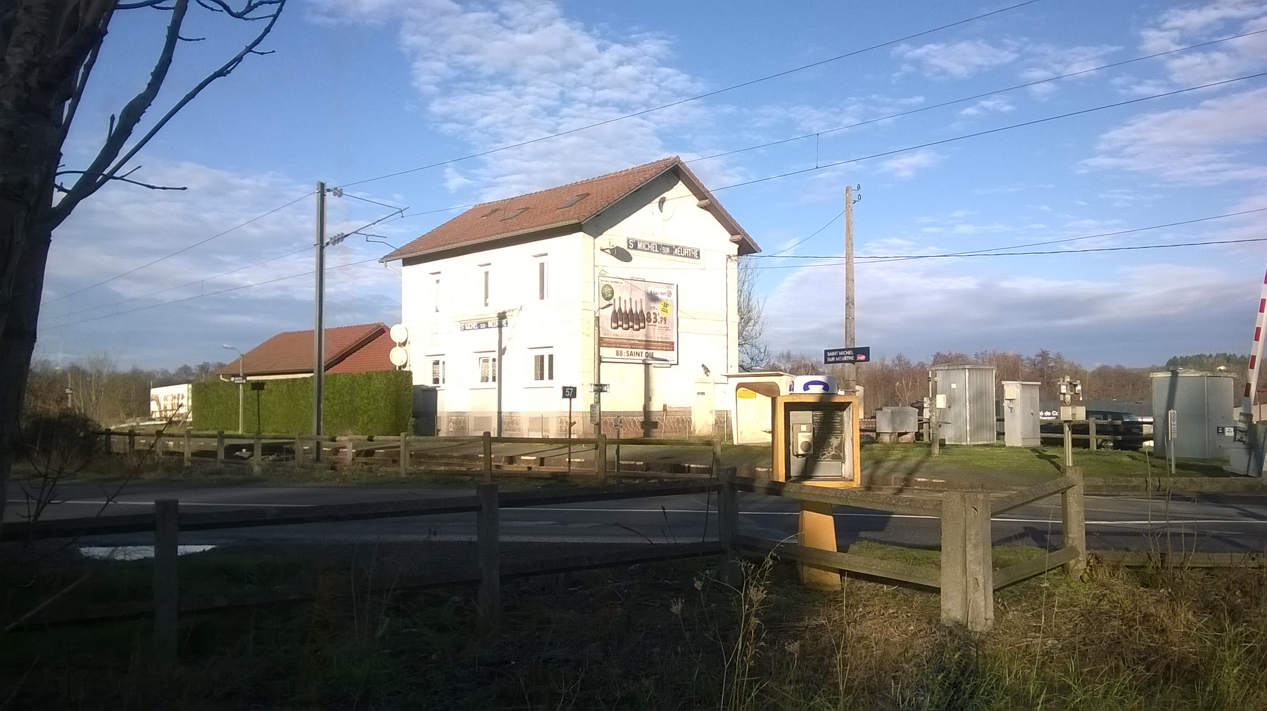 Bahnhof Saint-Michel-sur-Meurthe (Département Vosges, Frankreich)